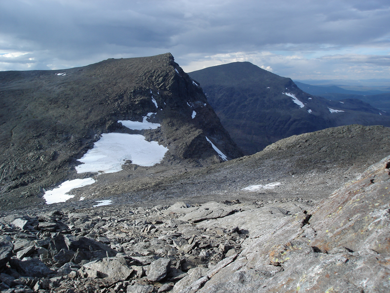 Vy från Mothseretjåhke mot norr. Närmast Södra Sytertoppen och i fonden den nordliga toppen.